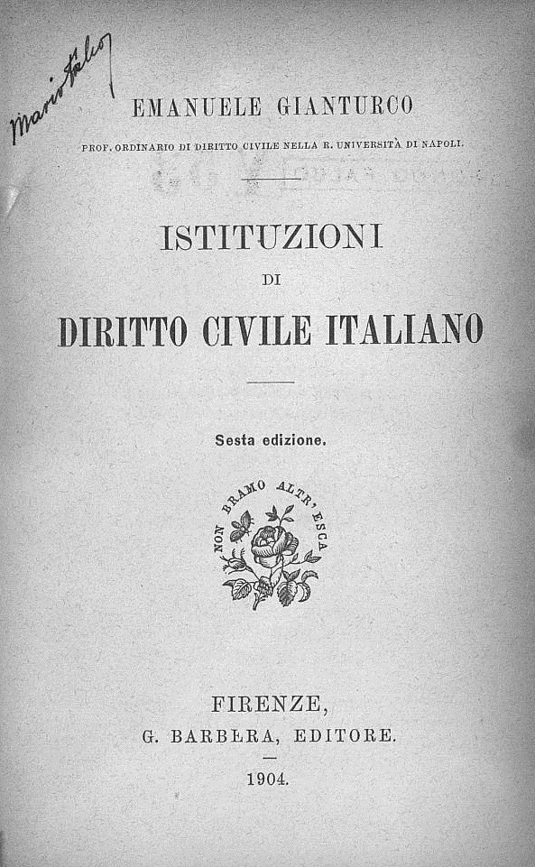 Frontespizio